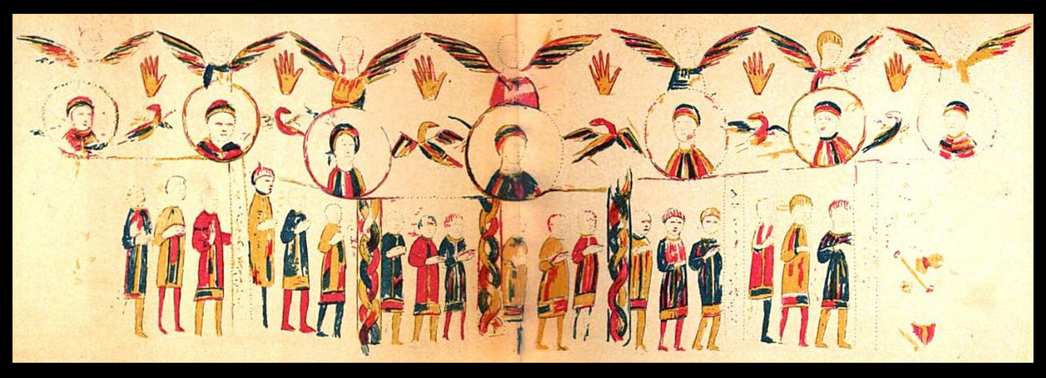 Illustration représentant une tapisserie découverte dans la châsse de Saint-Landry de Soignies